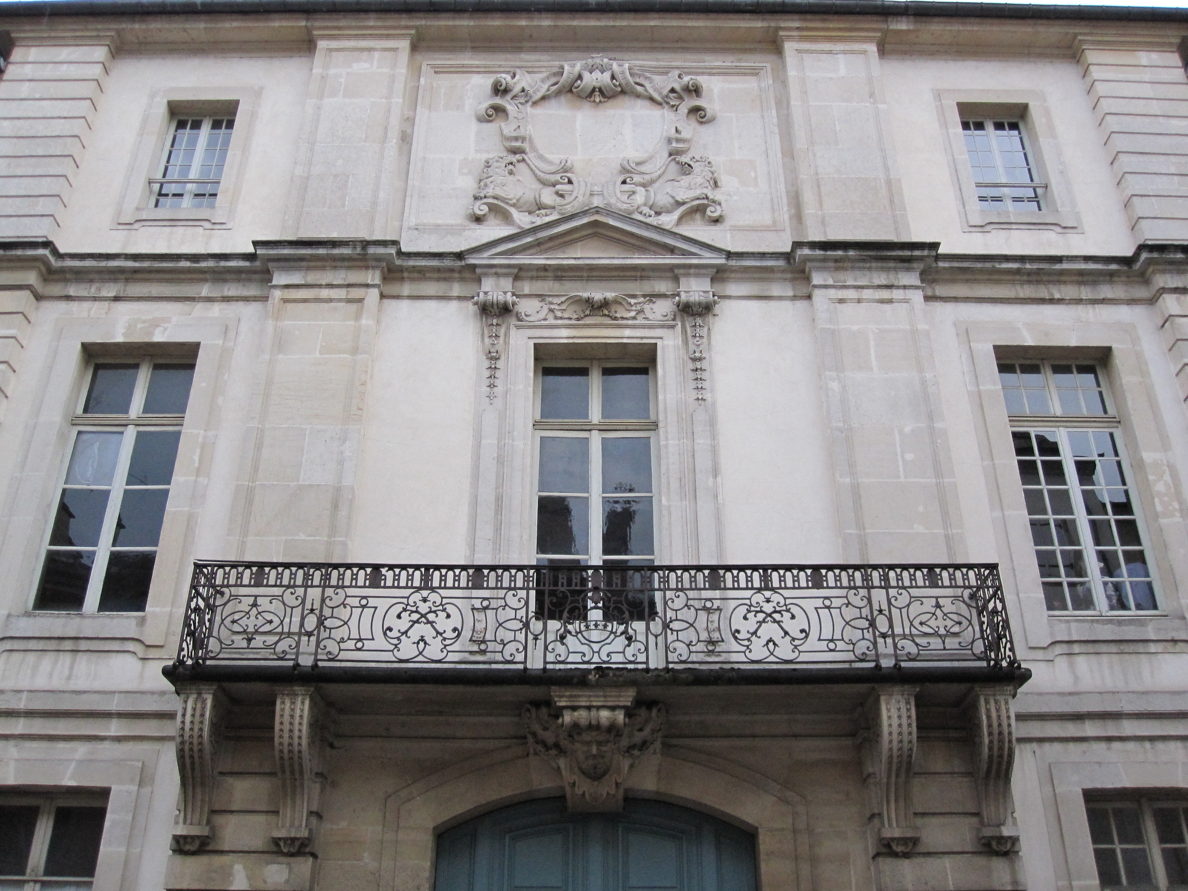 Nancy, Lorraine : Hôtel de Ferraris - balcon : ferronnerie aux armes de la famille de Saint-Rémy de Fontette (d'argent à une fasce d'azur chargée de trois fleurs de lys d'or), et au chiffre FF (Ferraris-Fontette).